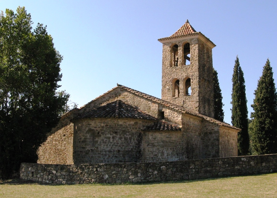 Romanesque Church Sant Martí de Capsec (Val de Bianya, Catalunya, Spain)